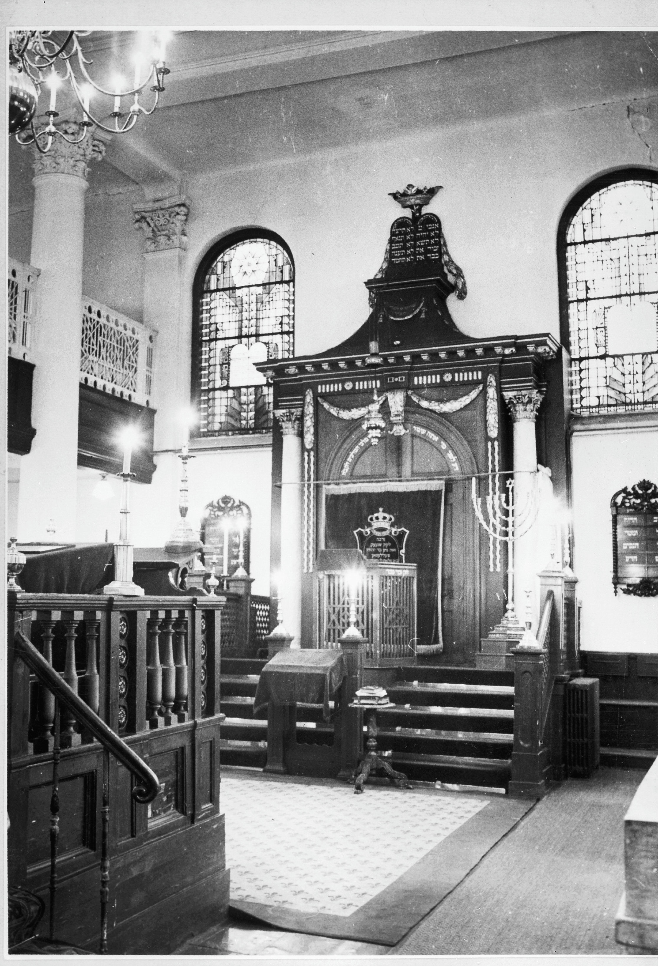 Synagoge: voorgevel